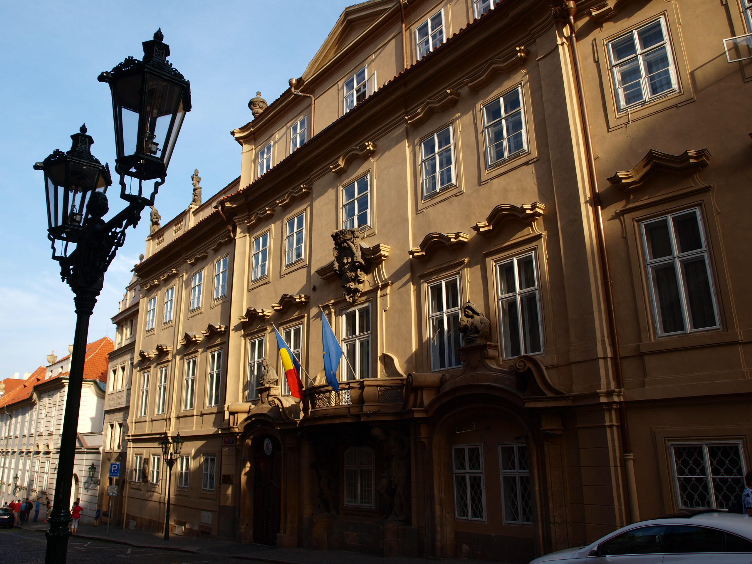 Morzniský palác (Nerudova)